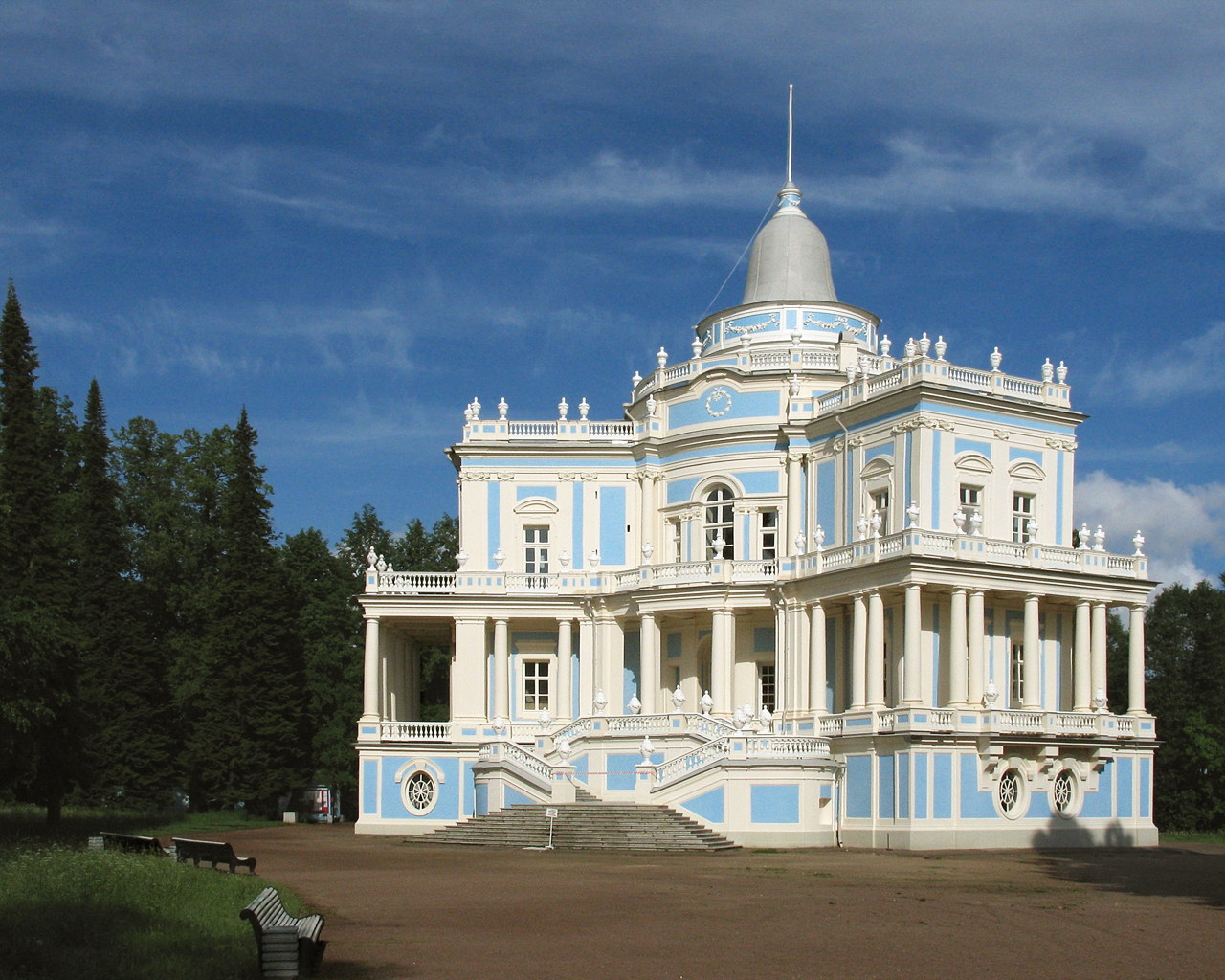 павильон "Катальная горка" в Ораниенбауме